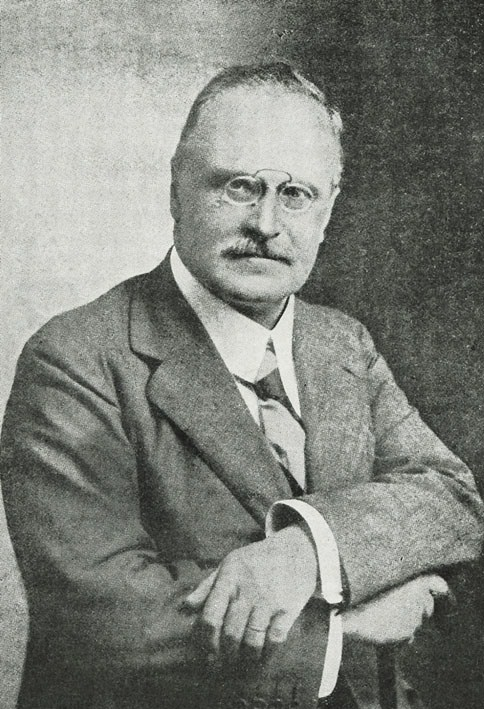 Foto ritratto di August Abegg